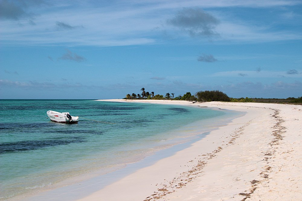 Islas las aves venezuela